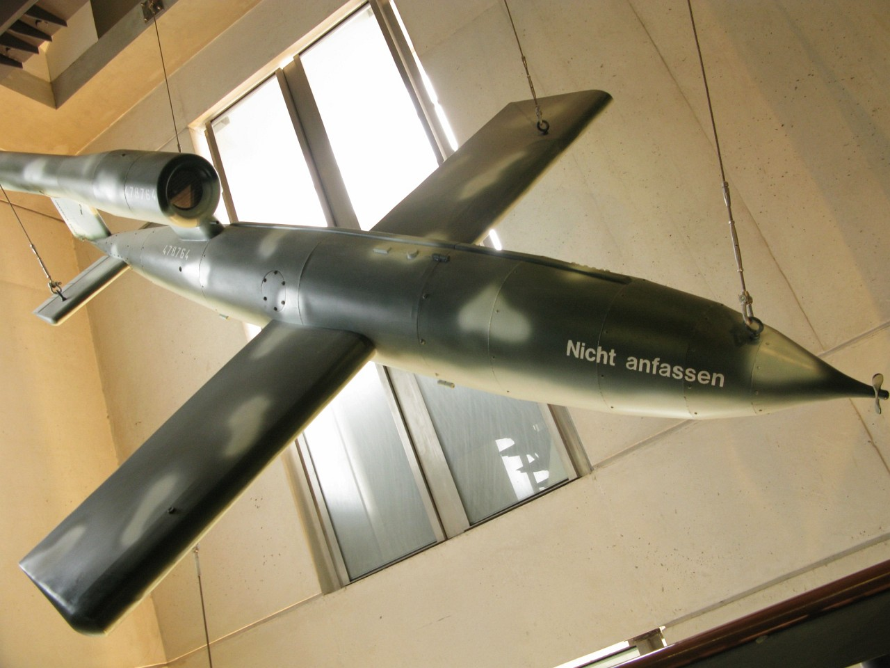 A V-1 bomb on display in Paris, in Musée de l'Armée.